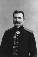 Яков Поляков - генконсул Персии